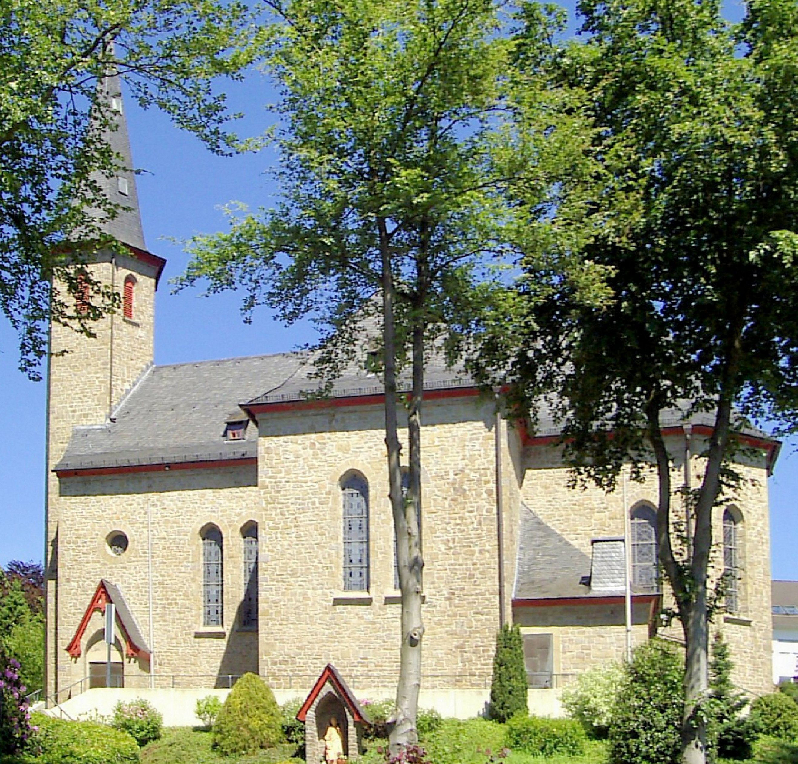 katholische Kirche St. Antonius in Denklingen, Oberbergischer Kreis, Nordrhein-Westfalen, Deutschland